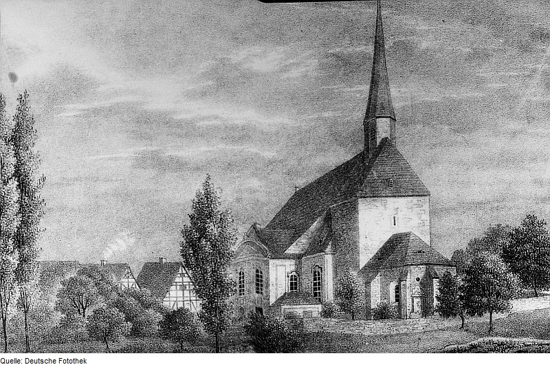 Original image description from the Deutsche Fotothek Reinsberg-Neukirchen. Kirche zu Neukirchen